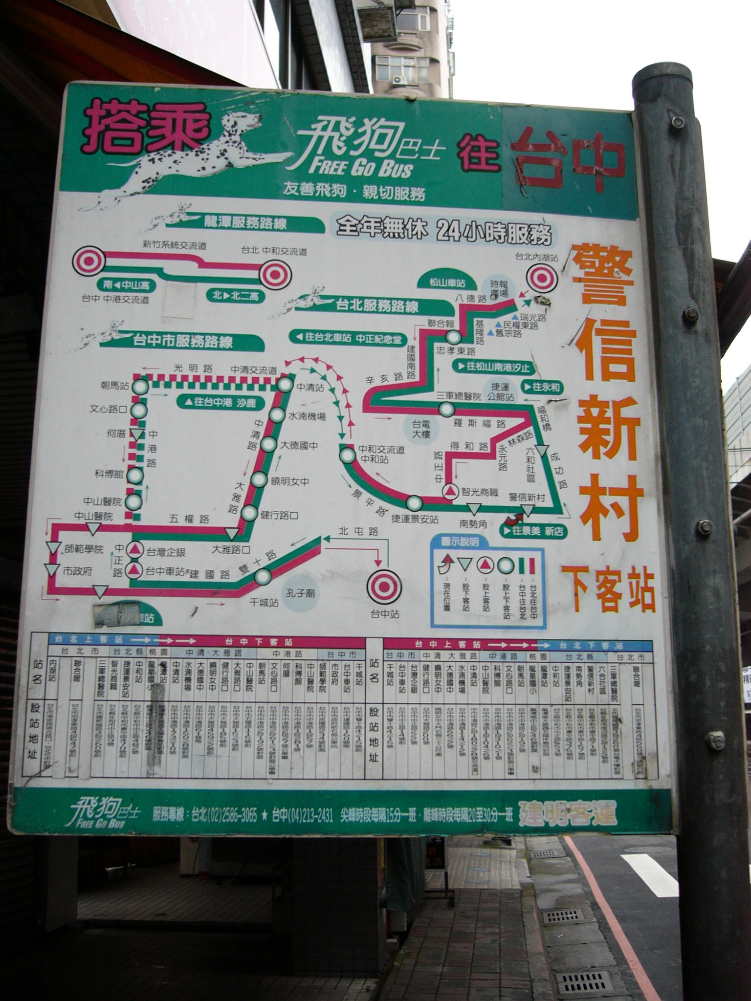 臺北縣中和市景平路，飛狗巴士「警信新村」站牌。